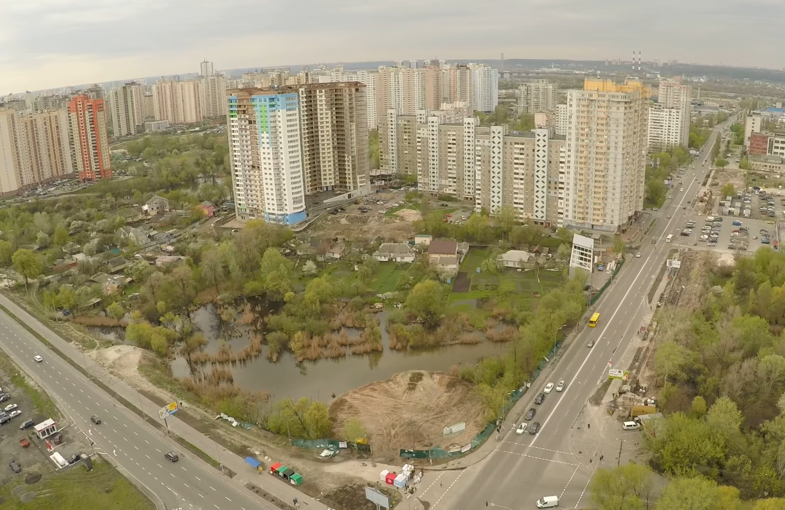 Озеро Качине, Київ, 2016 рік